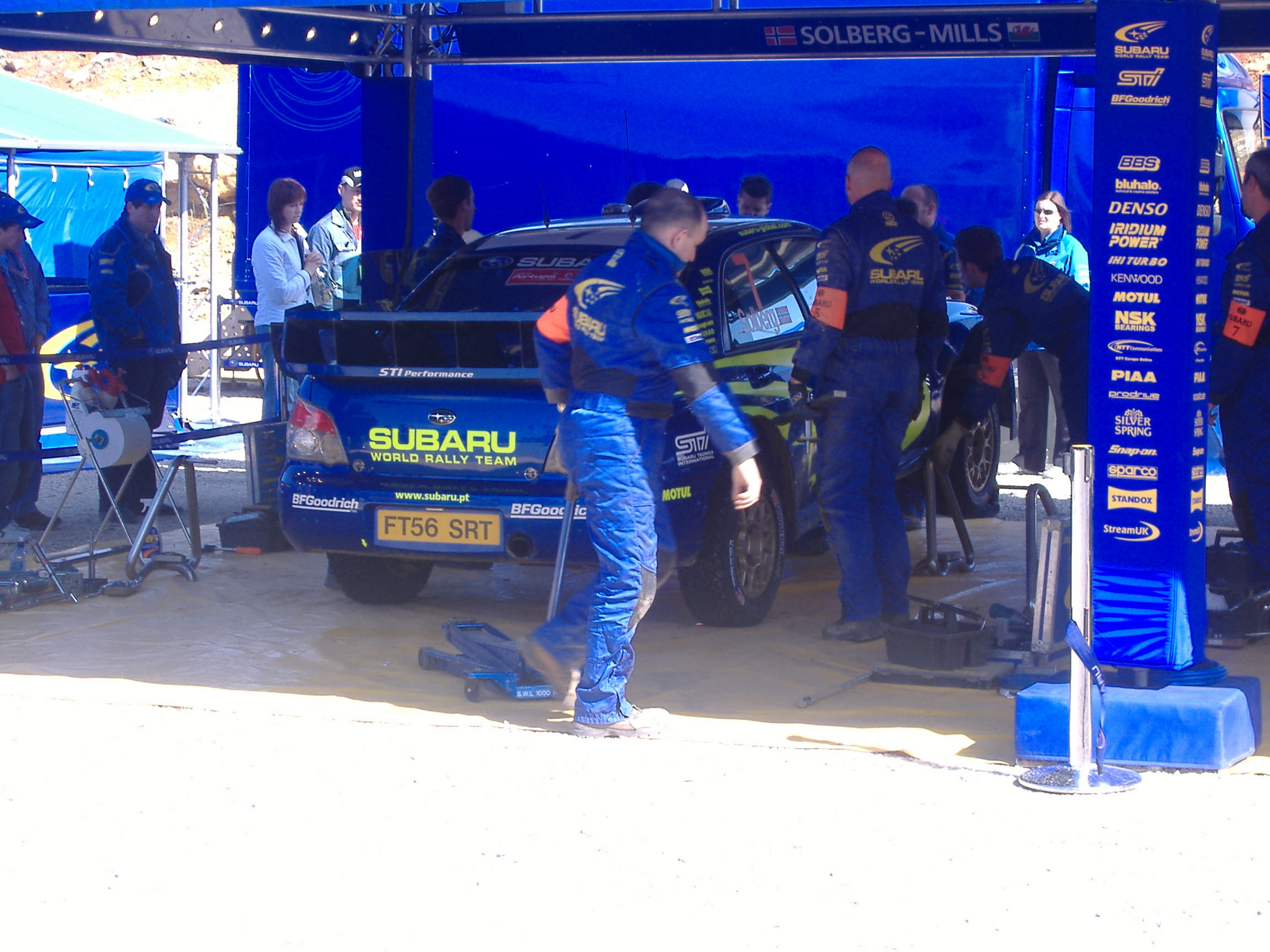 Subaru World Rally Team en el Rally de Portugal 2007.